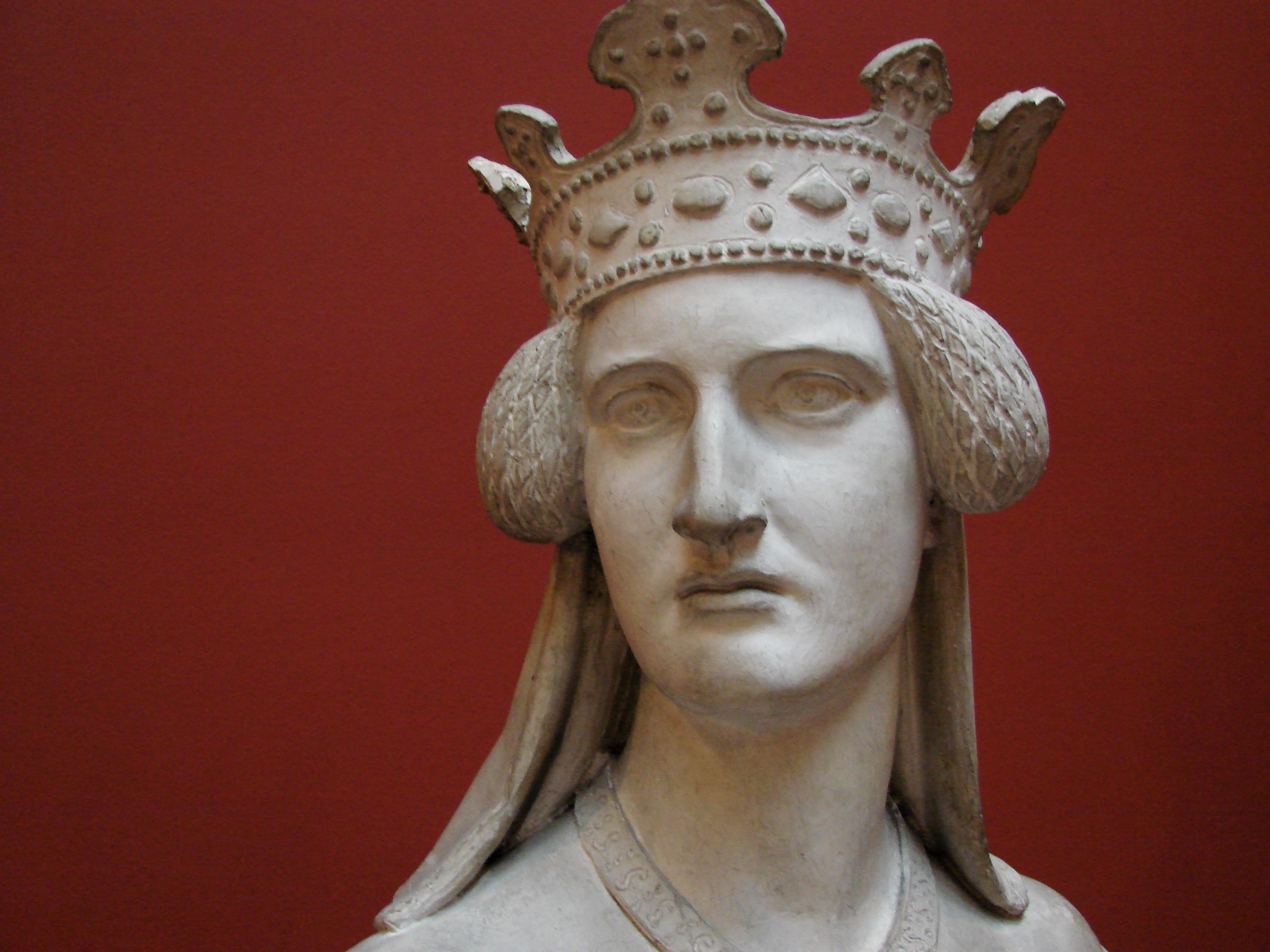 Dronning Philippa, detalje fra skulptur af H. W. Bissen (1798-1868), Glyptoteket København